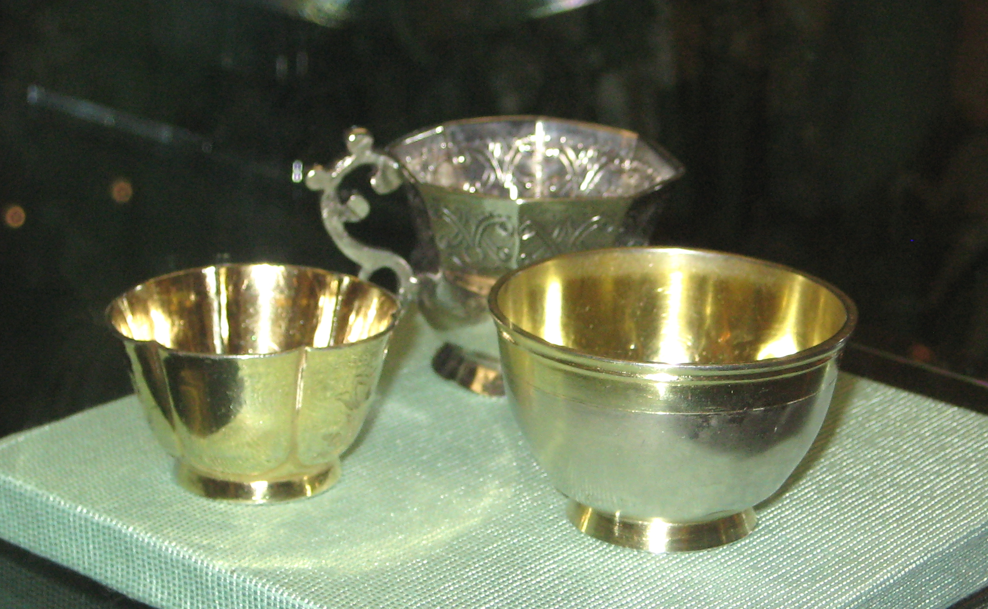 Чарки с жетонами на коронацию Анны Иоанновны (1730), на мир с Турцией (1739), на смерть Анны Иоанновны (1740). Россия, 1730-40. Серебро, ГИМ